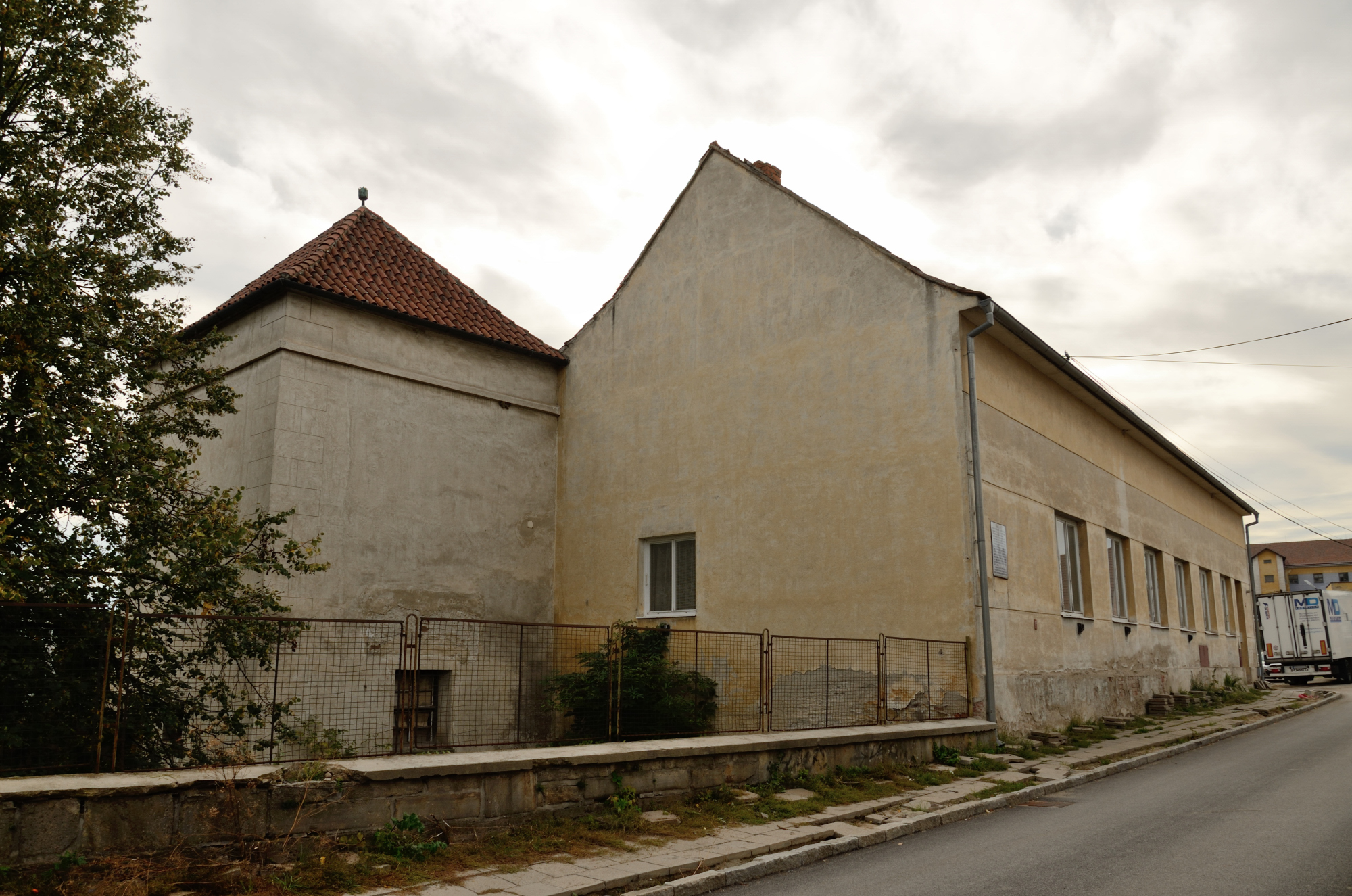 sbor bratrský (Ivančice), Ve sboru 360/10, Ivančice